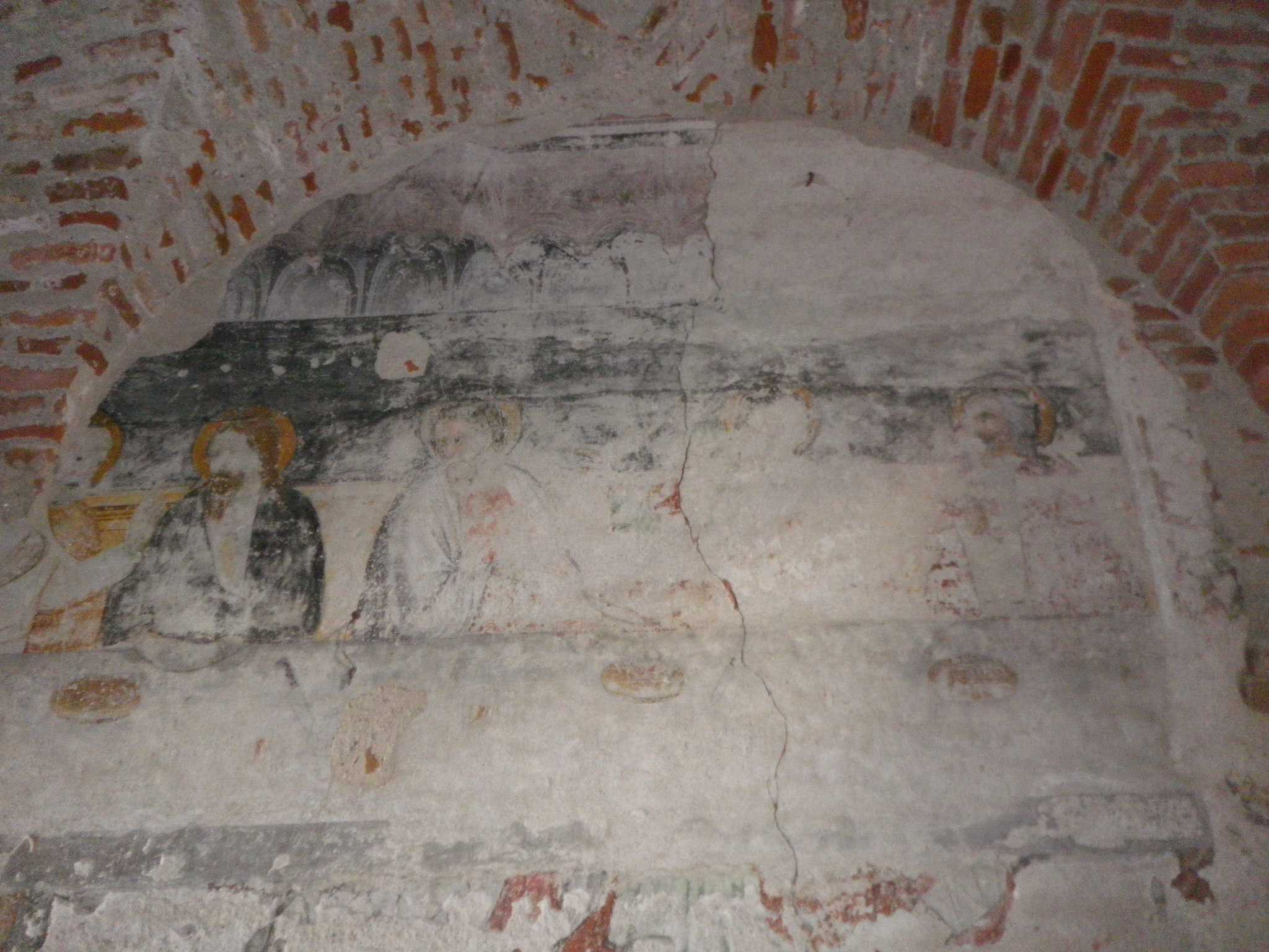 Affresco all'interno del refettorio dell'abbazia di Staffarda